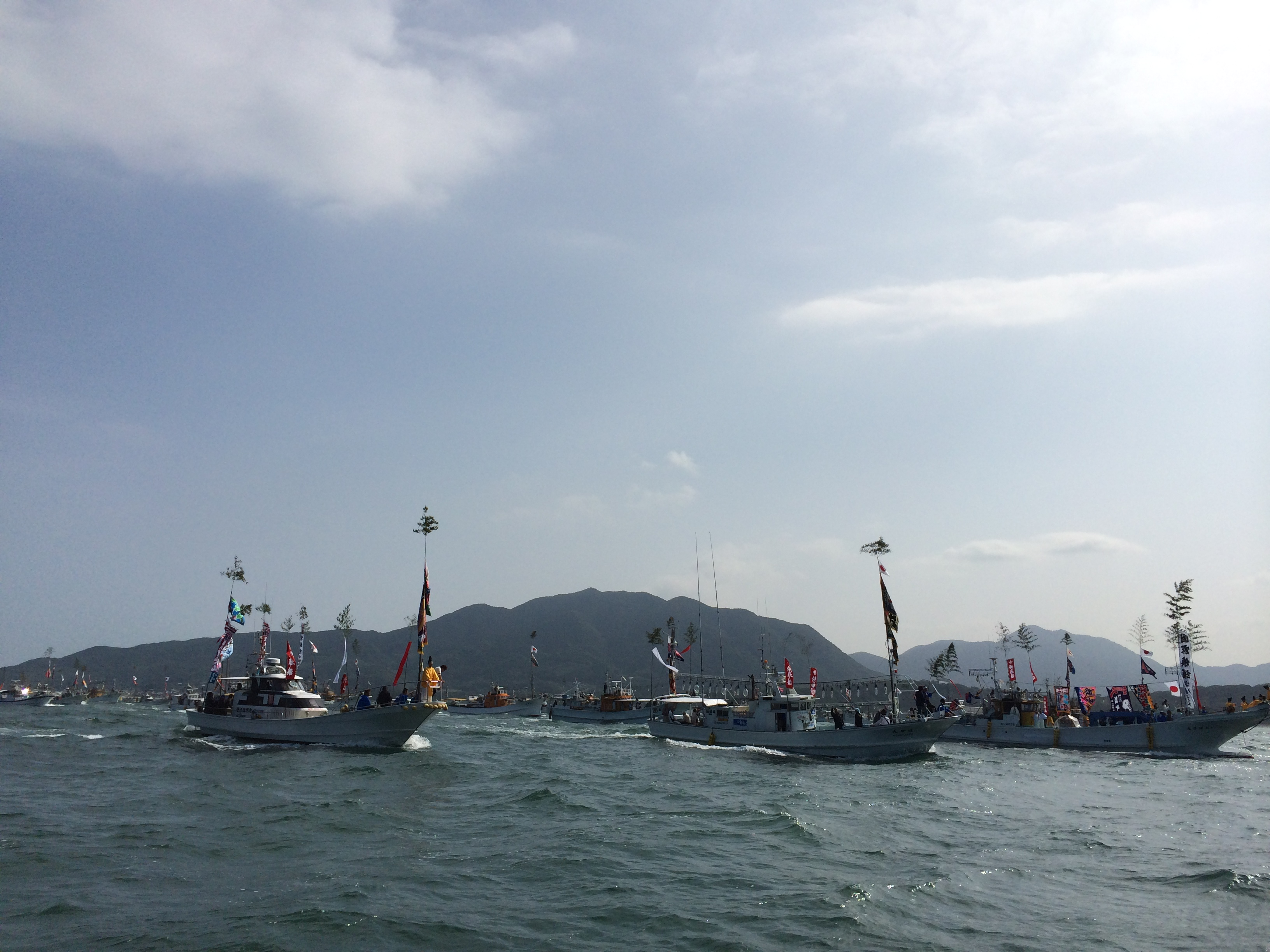 毎年10月1日に福岡県宗像市の宗像大社秋季大祭で海上安全や大漁など願って行われる祭礼である「みあれ祭」の海上神幸行事のシーン（2014年）